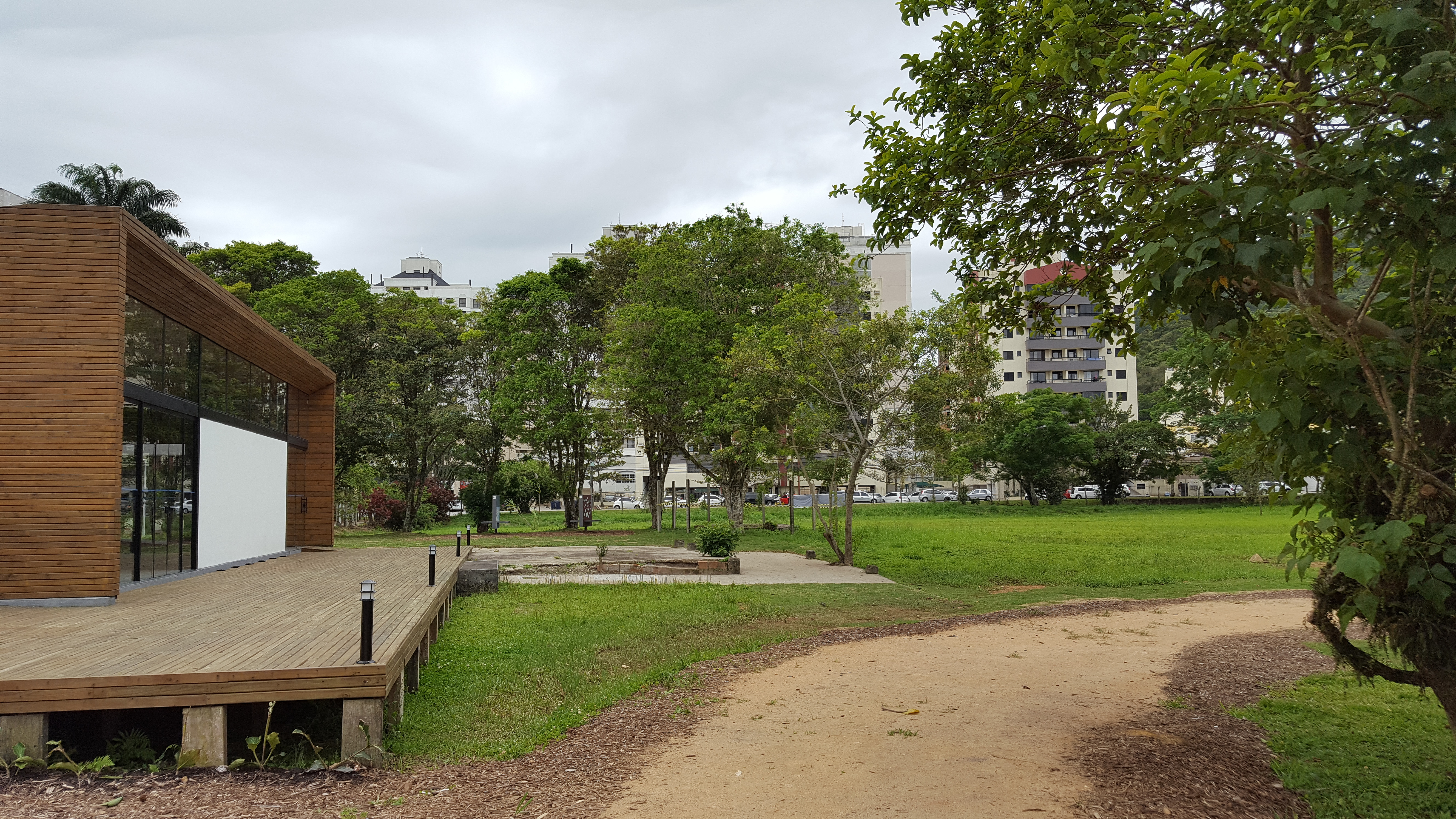 Jardim Botânico de Florianópolis, caminho do gramado.